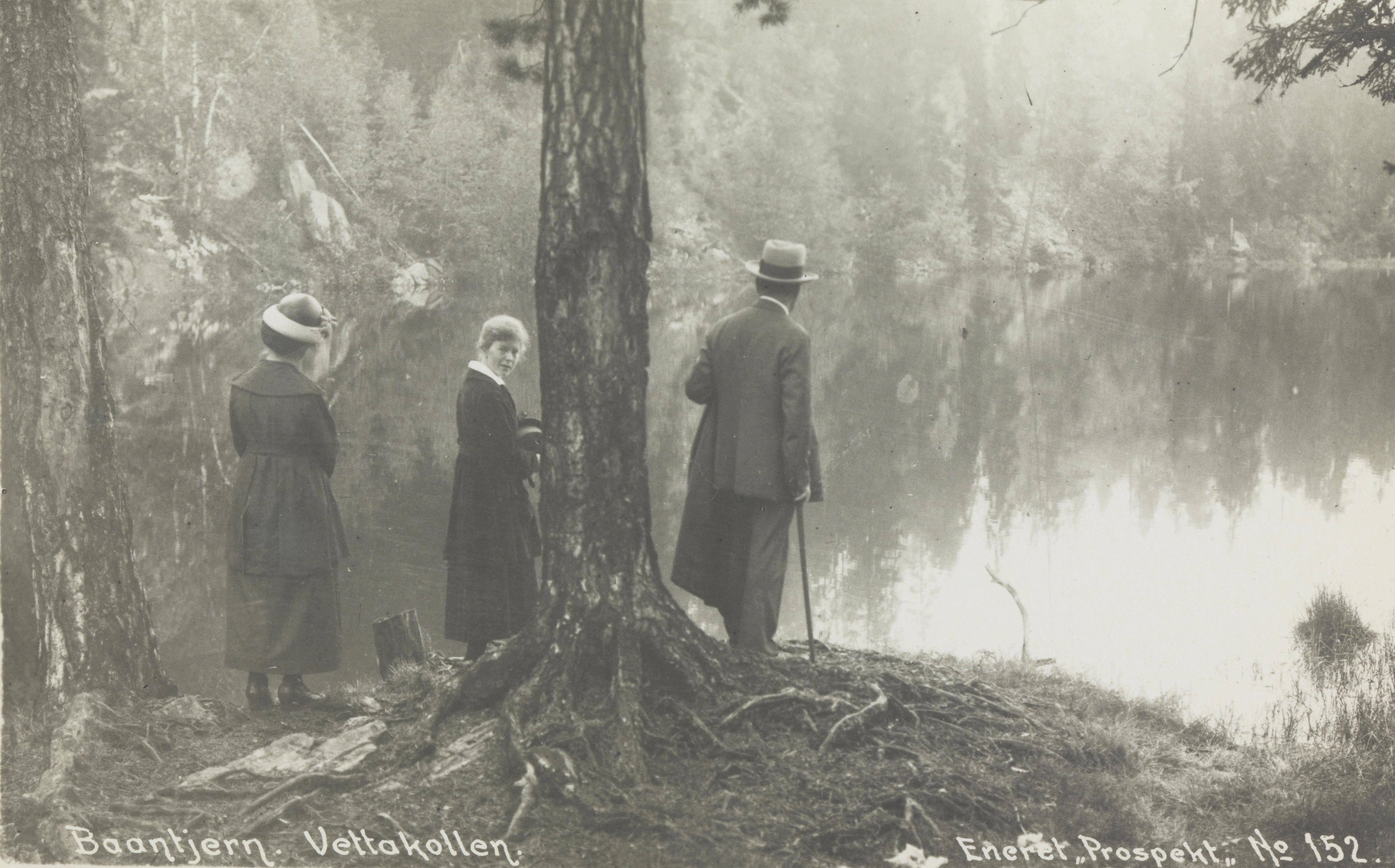 Bildet er hentet fra Nasjonalbibliotekets bildesamling Bånntjern,Vettakollen, Oslo, Oslo